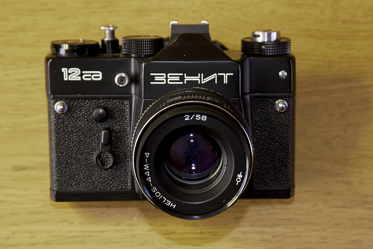 Photocamera Zenit 12SD